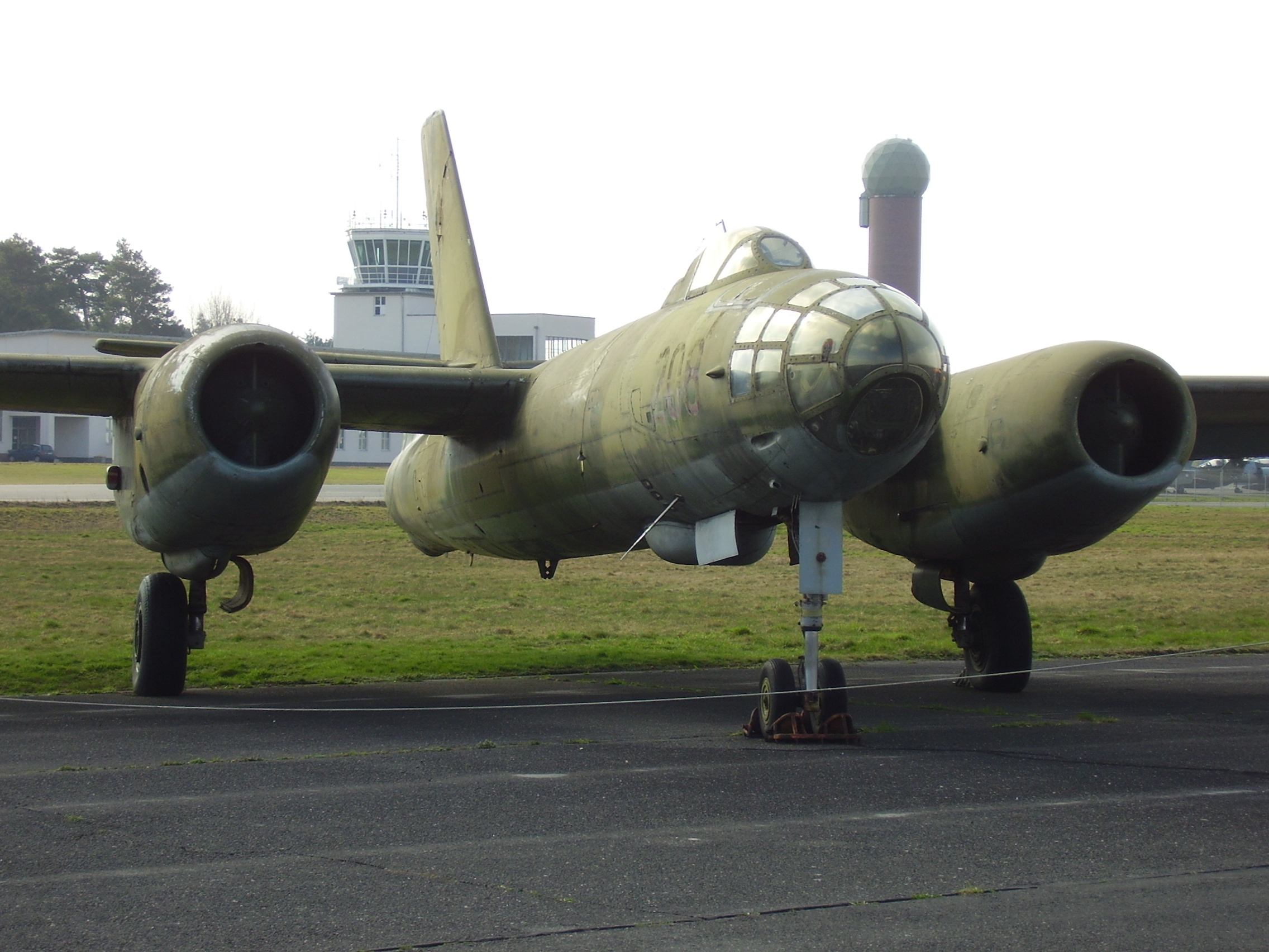 Luftwaffenmuseum der Bundeswehr; Airforce Museum of the Bundeswehr; Berlin-Gatow